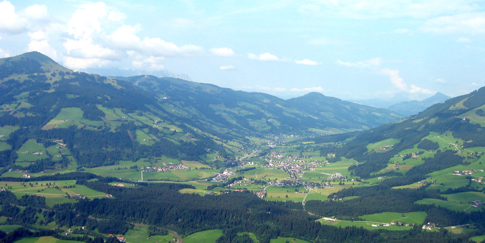 Blick auf das Brixental/Tirol (Vom Schwaigerberg in Westendorf aus in Richtung Osten. Im Bild sind die Ortschaften Westendorf und Brixen zu erkennen.)